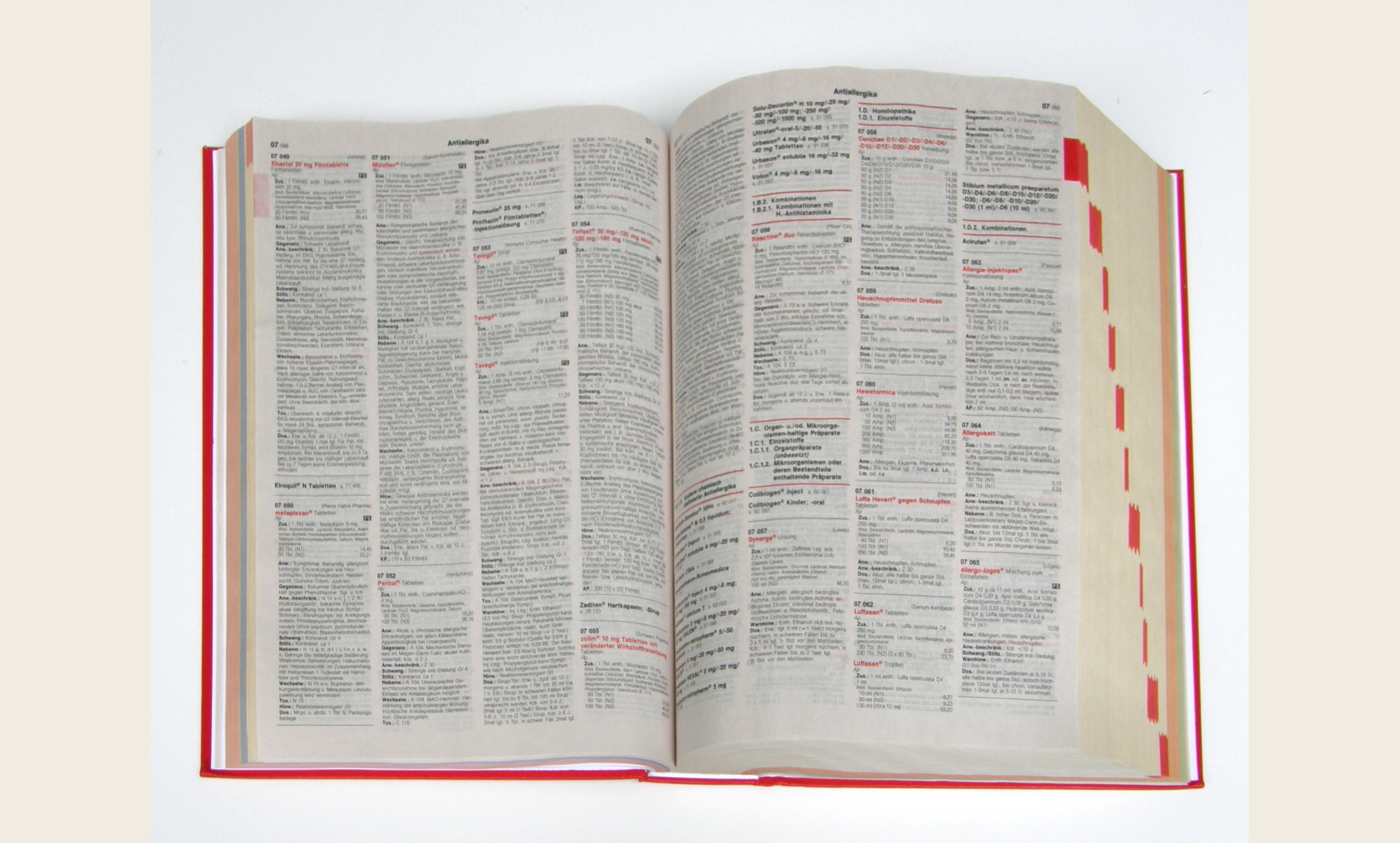 Rote Liste - Arzneimittel (Musterseite)